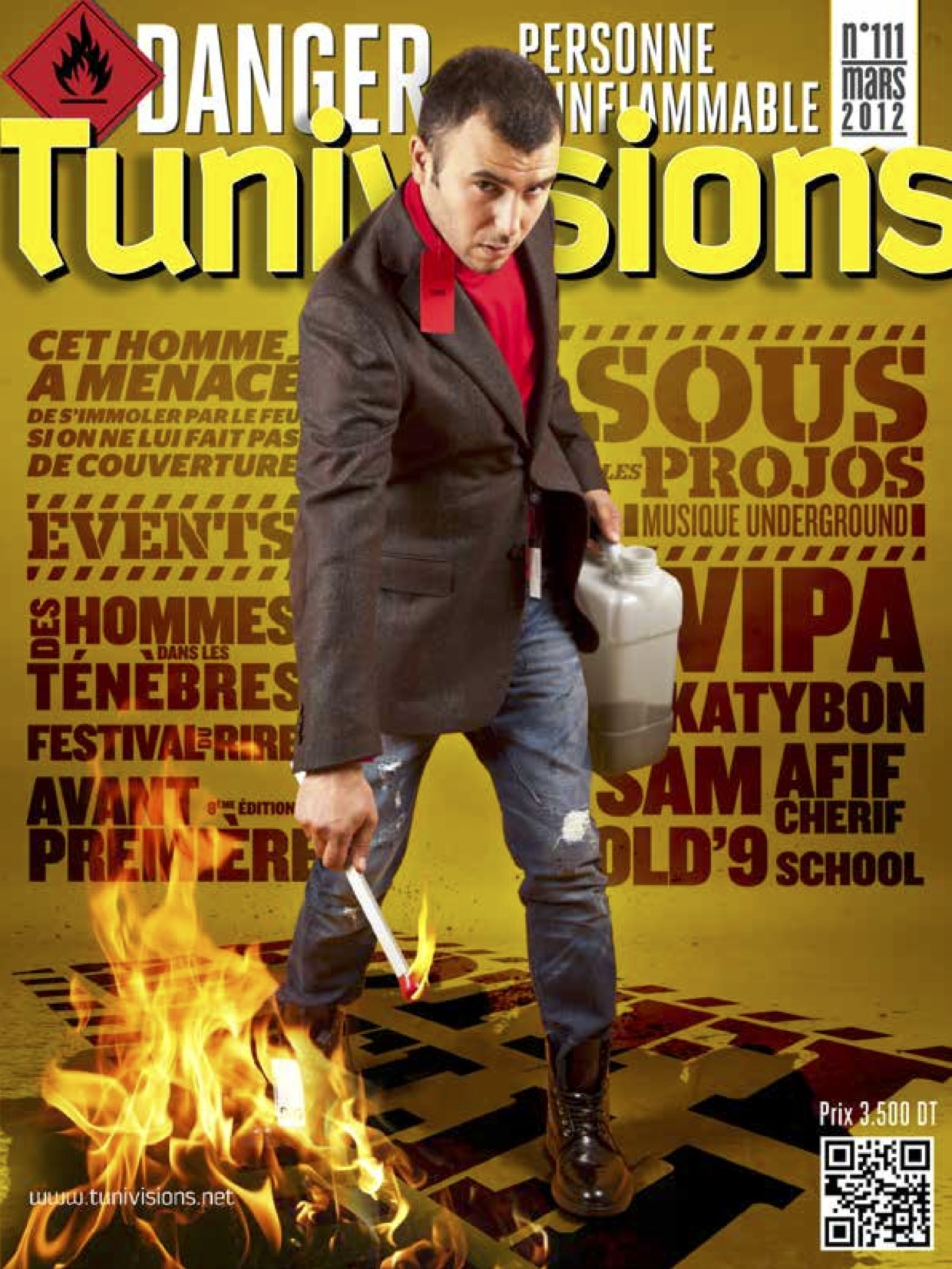 Couverture du numéro 111 du magazine tunisien Tunivisions.